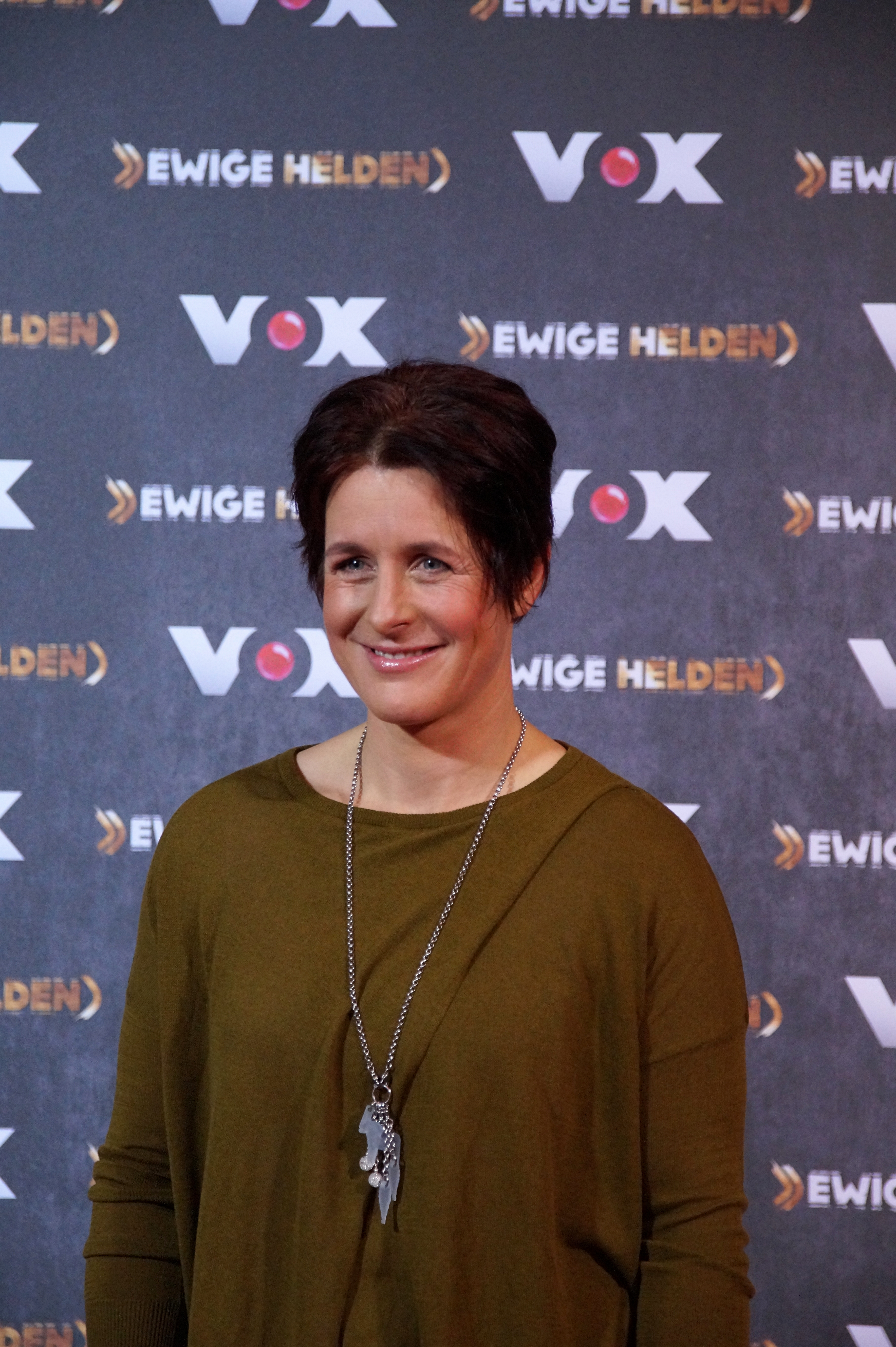 Uschi Disl beim VOX "Ewige Helden" Pressetermin, im Dezember 2015.